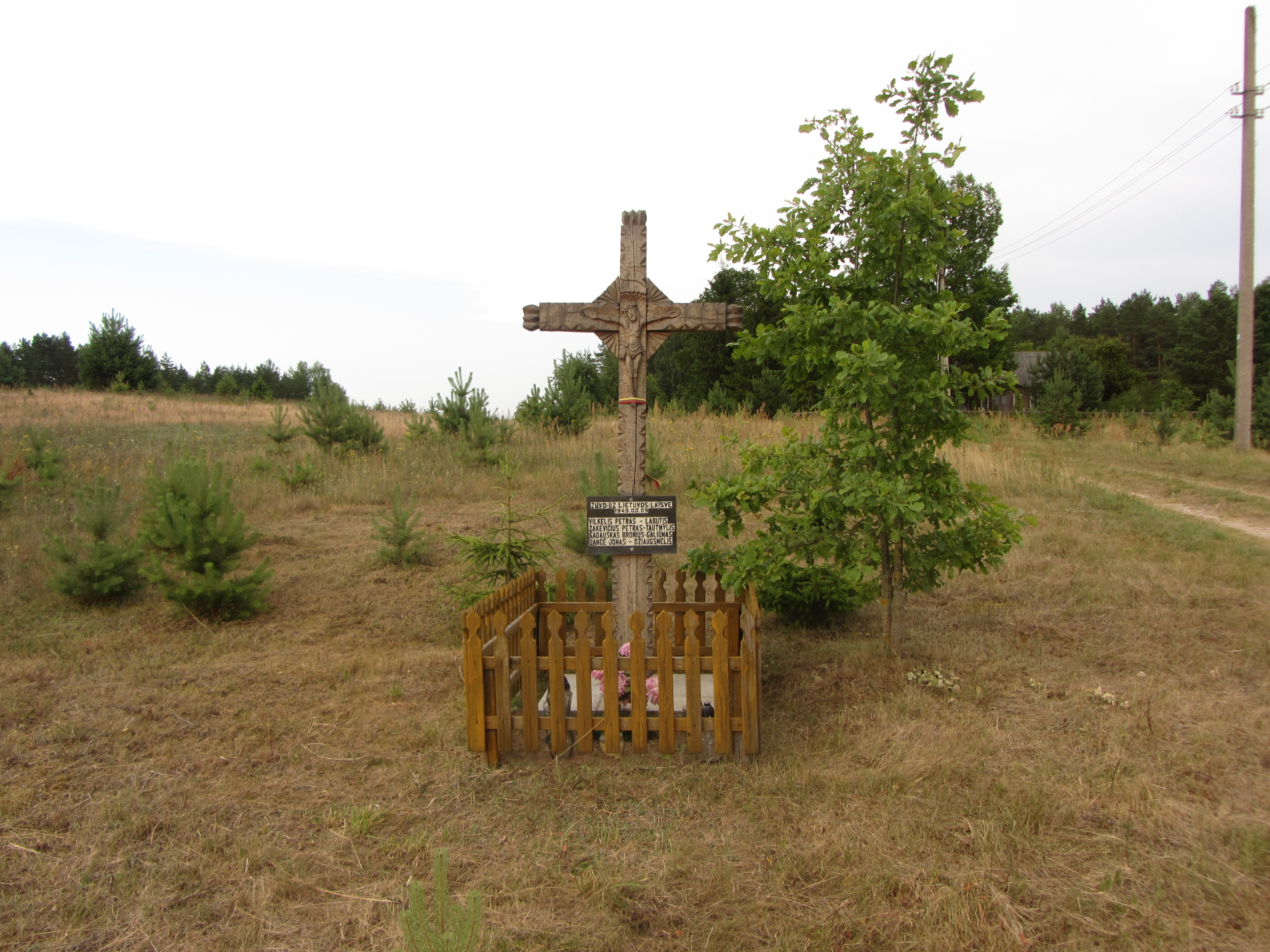 Viktarinas, Lithuania